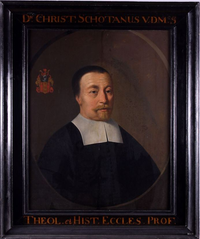 Portret in olieverf van Christianus Schotanus à Sterringa, professor Grieks en godgeleerdheid aan de Franeker universiteit van 1639 tot 1671. Christianus Schotanus (Schingen 16 augustus 1603 - 12 november 1673) was professor Grieks oude kerkgeschiedenis en theologie aan de Franeker universiteit van 1639 tot 1671. Hij publiceerde de nog steeds bekende 'Kronyk van Friesland'. (tekst Museum Martena, Franeker)